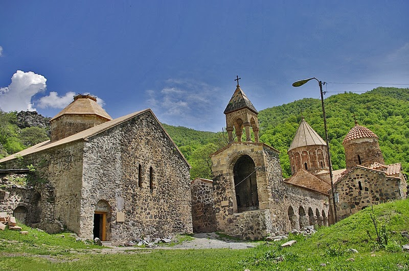 Дадиванк